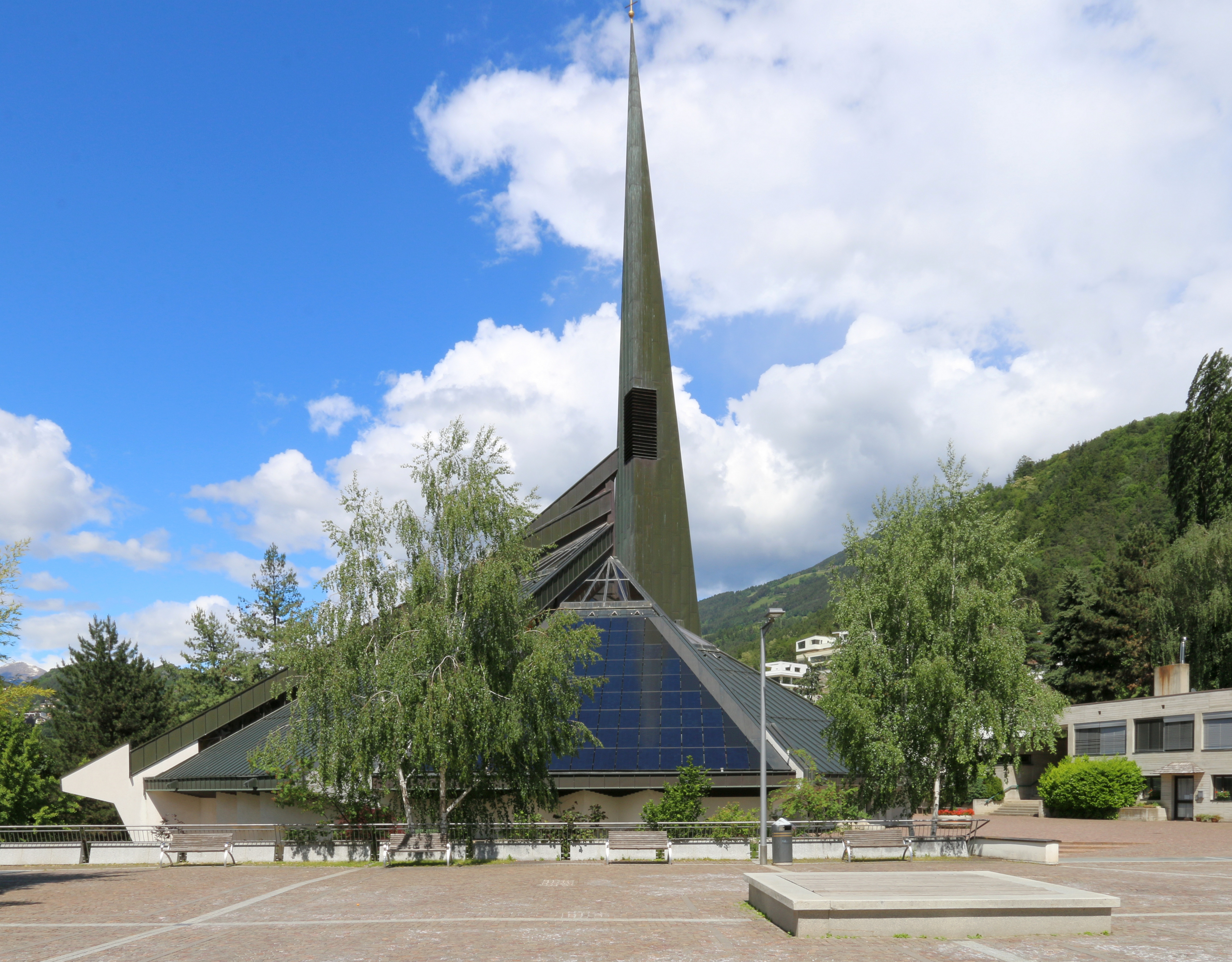 Brixen-Milland, Südtirol: Neue Pfarrkirche